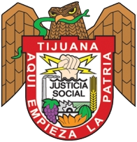 Escudo del Municipio de Tijuana